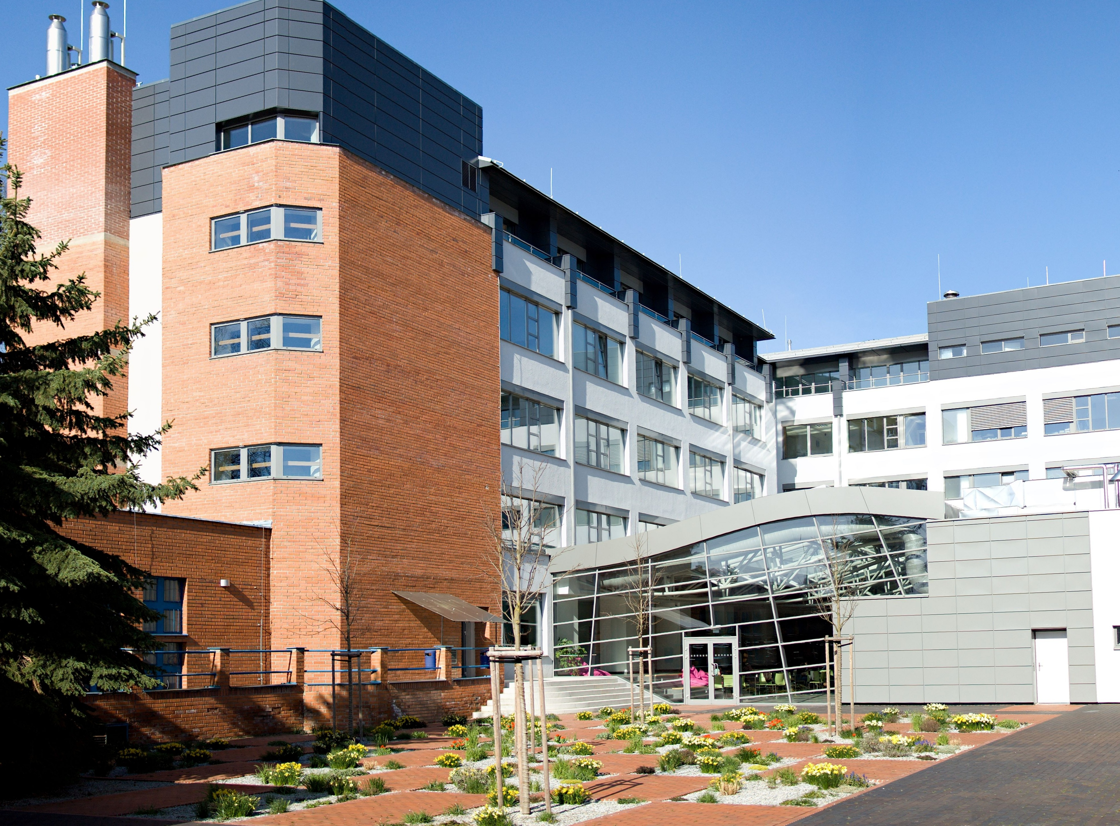 Fakulta managementu Vysoké školy ekonomické - dvorana